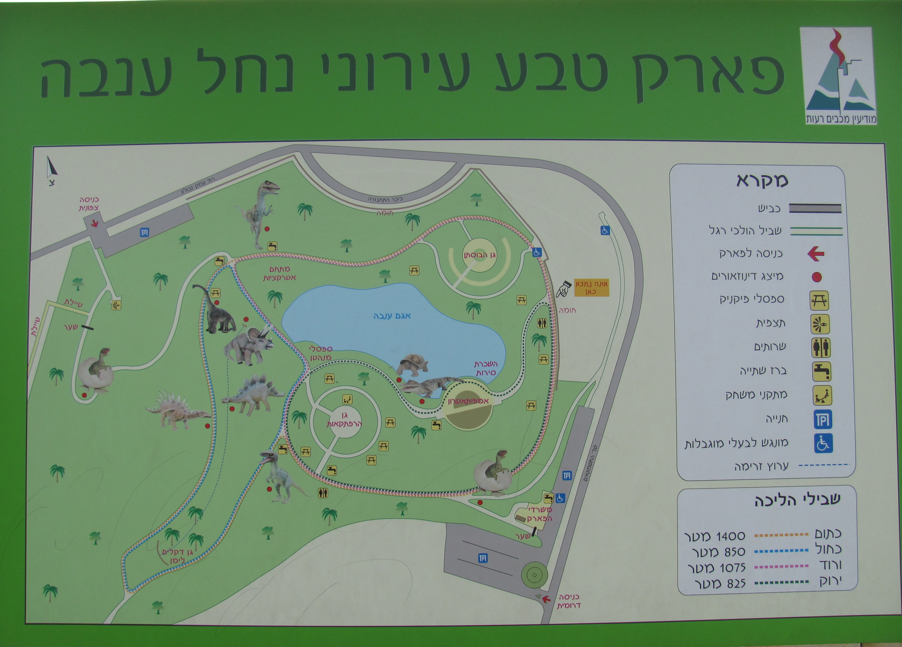 מפה של פארק נחל ענבה